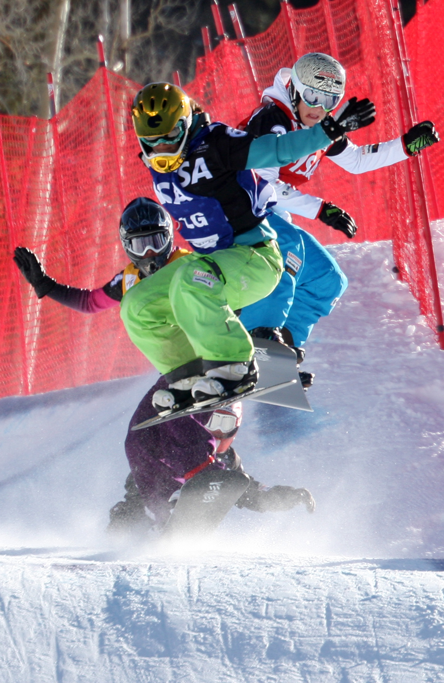 Telluride_SBX_Quarter_Final_Ladies_Mellie_Francon_SUI_leading_Simona_Meiler_SUI_Deborah_Anthonioz_FRA_Emilie_Aubry_SUI_02